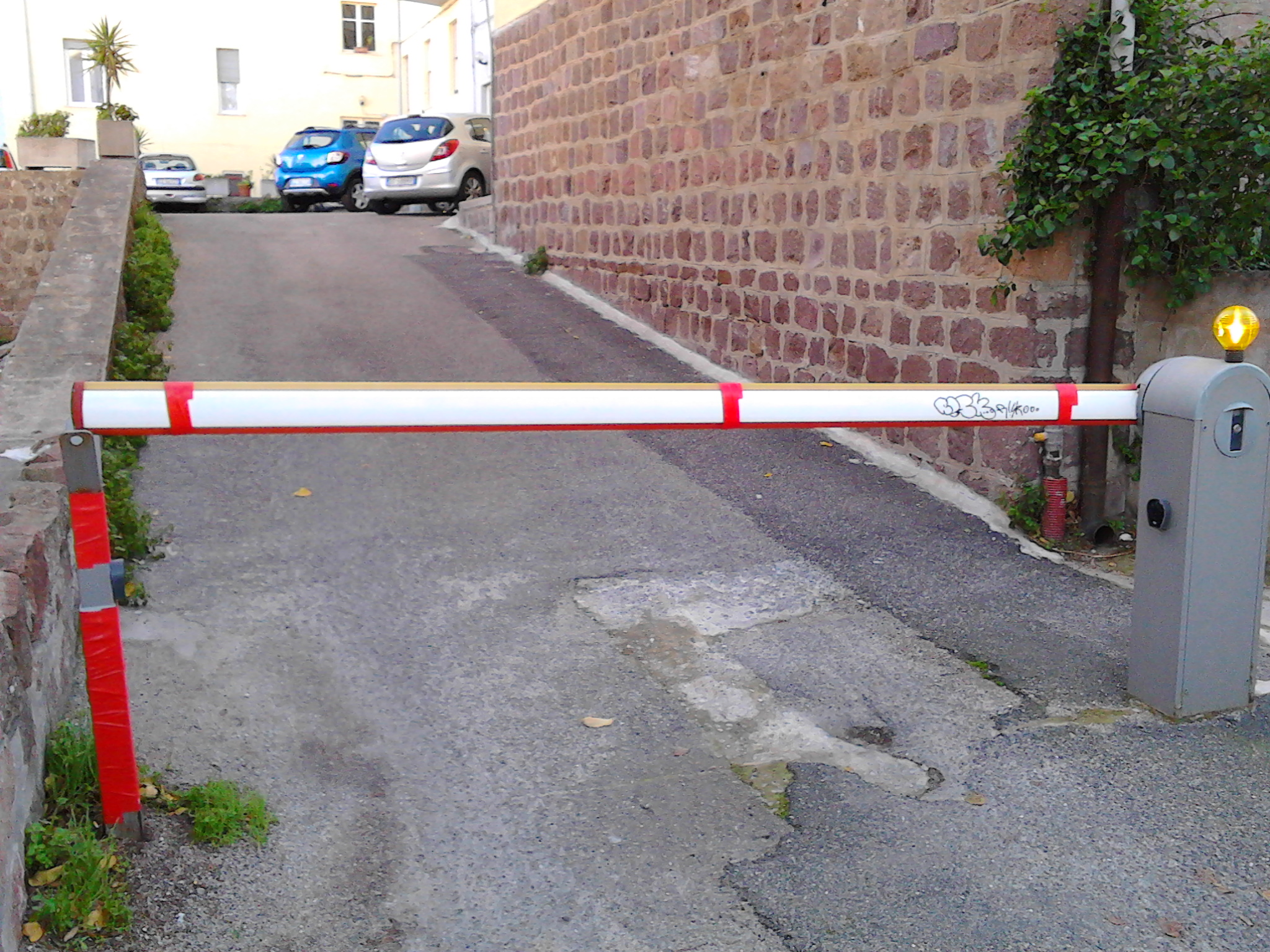 Barriera automatica per il controllo dell'accesso ad un parcheggio condominiale di Nuoro